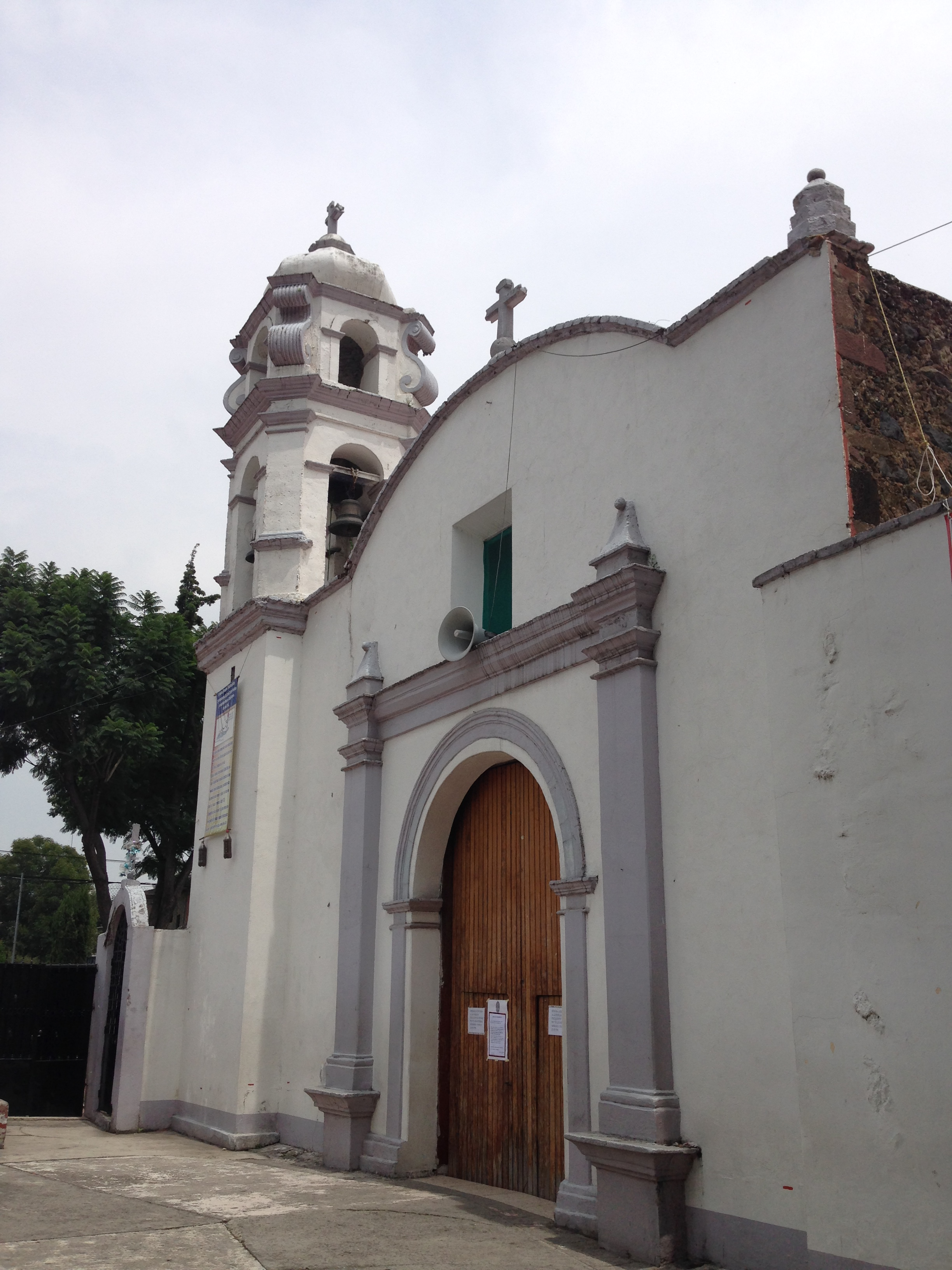 Entrada frontal de la iglesia , se observa una cupula